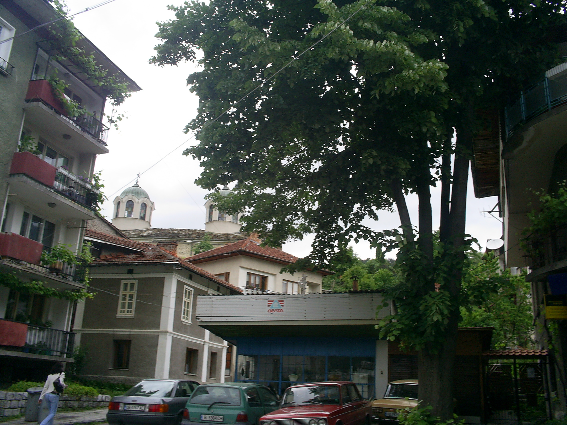 Street in Teteven, Bulgaria